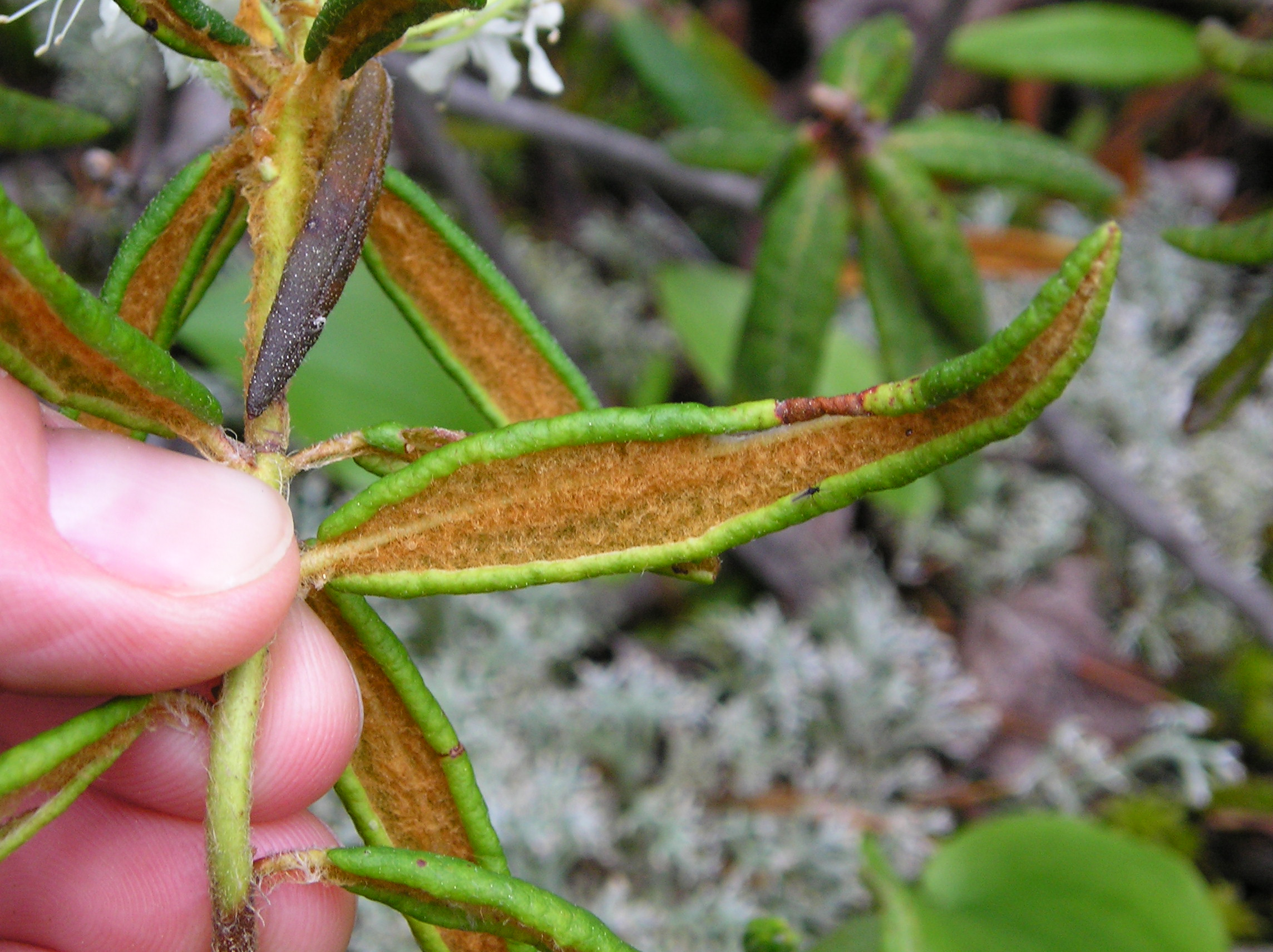 Ledum groenlandicum 1-eheep